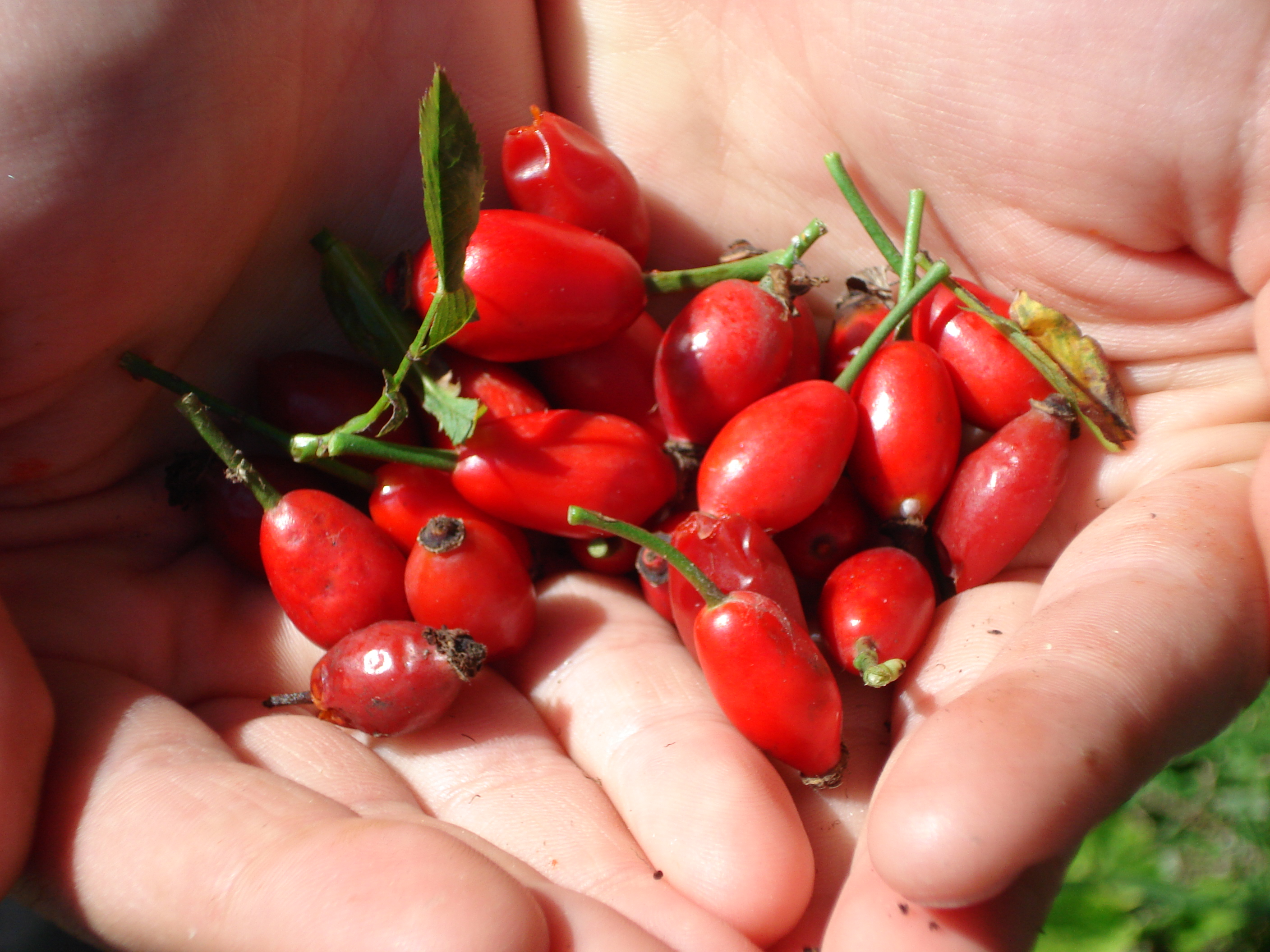 Rosa canina